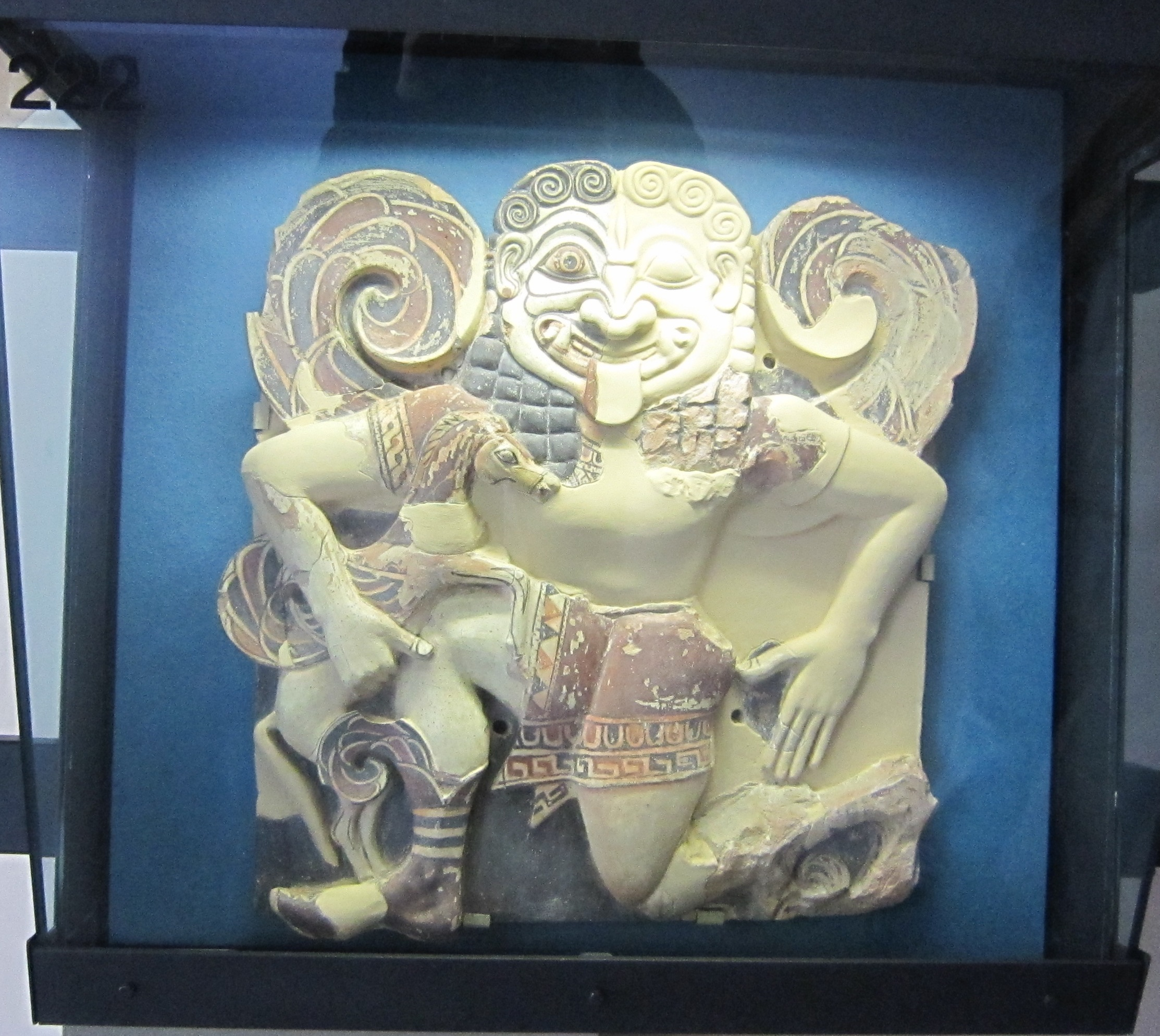 Gorgone greca, esposta nel Museo archeologico regionale di Siracusa "Paolo Orsi".